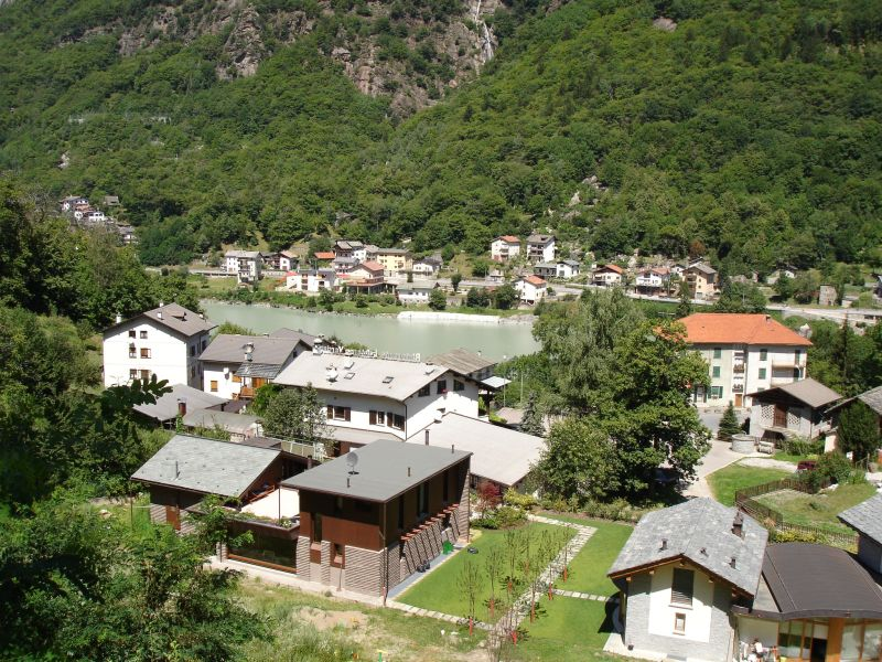 San Barnaba